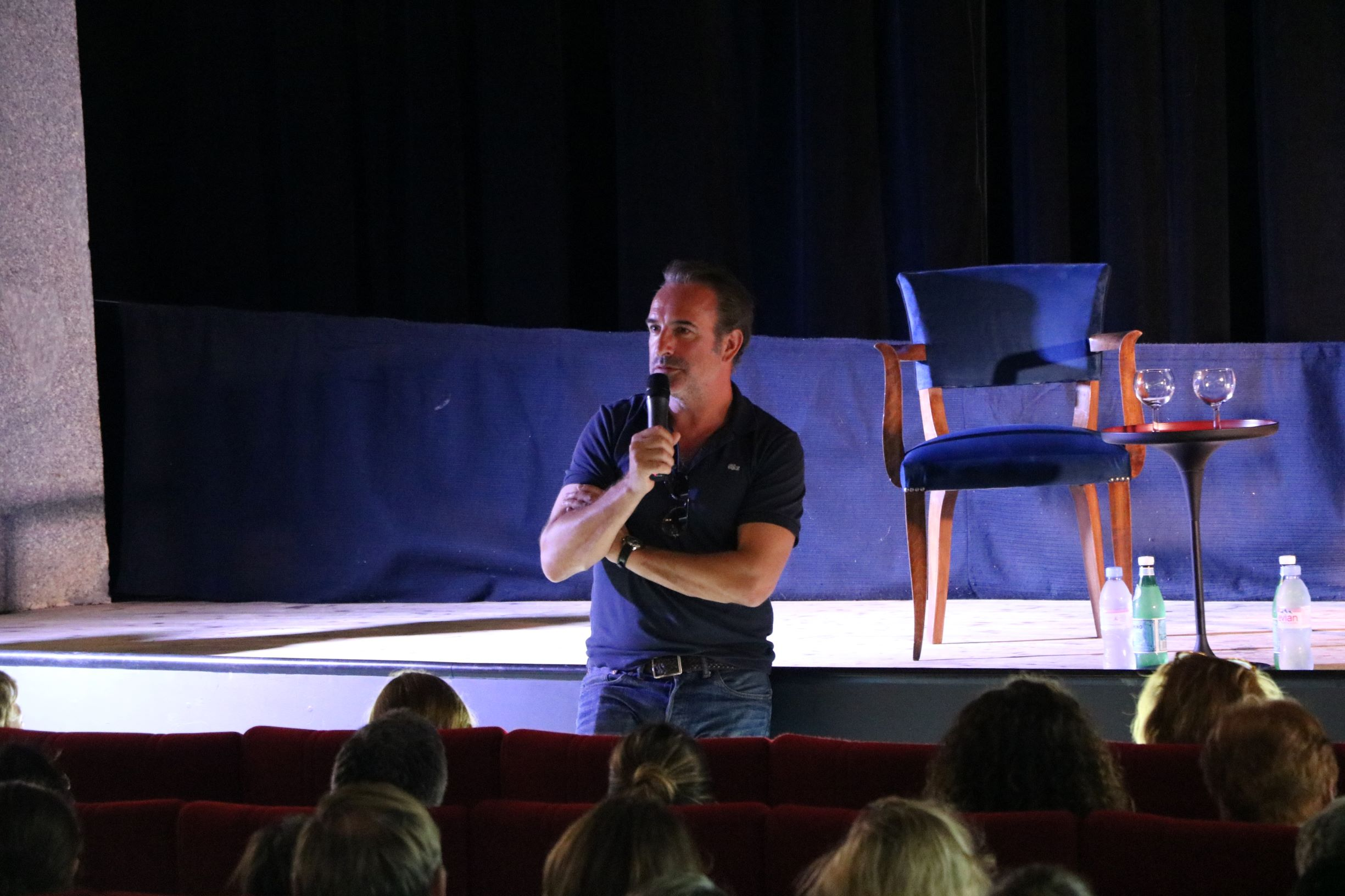 L'acteur Jean Dujardin, parrain de la 5e édition du festival du film de Pauillac. Rencontre au cinéma l'Éden le 4 juillet 2019.